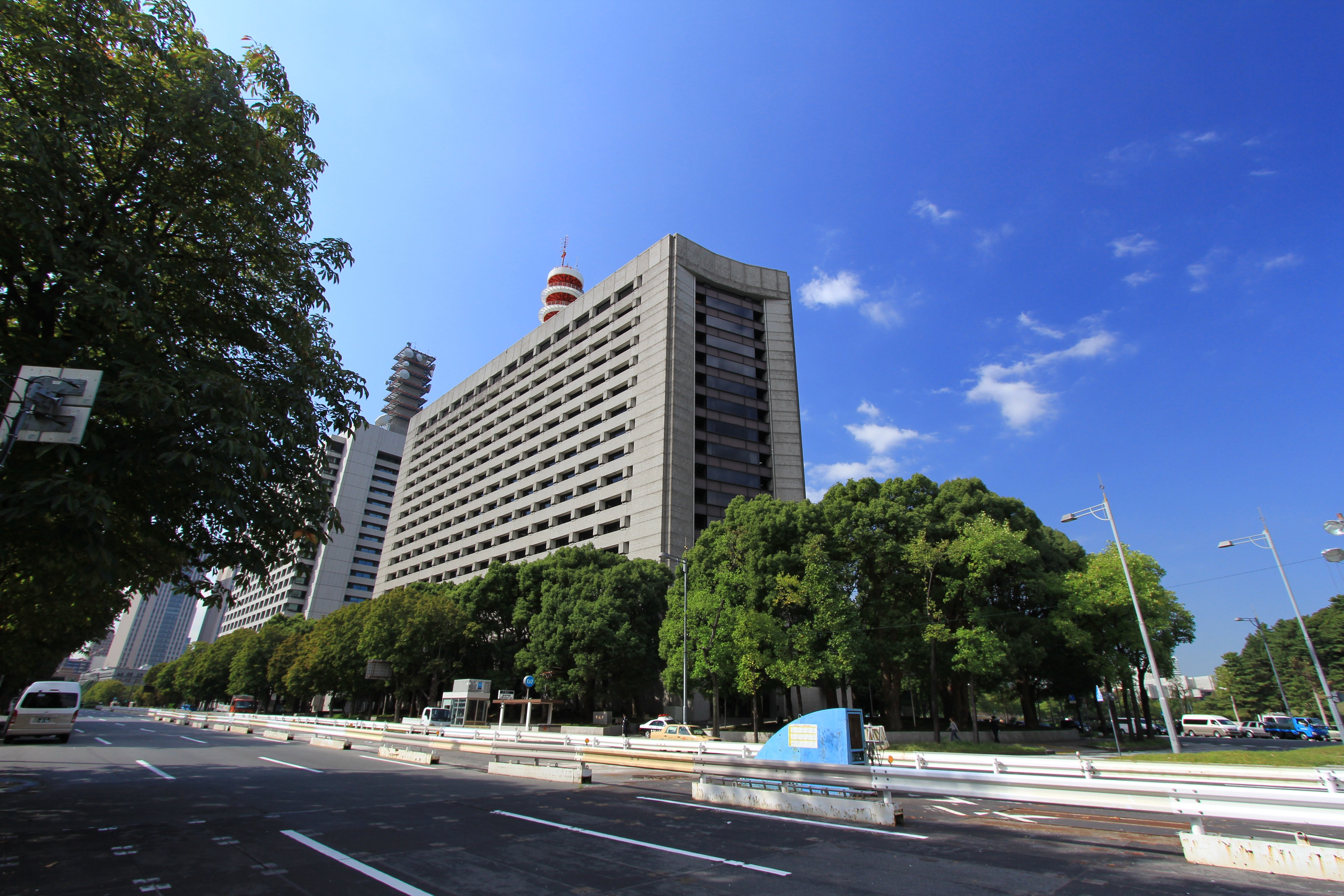 警視庁